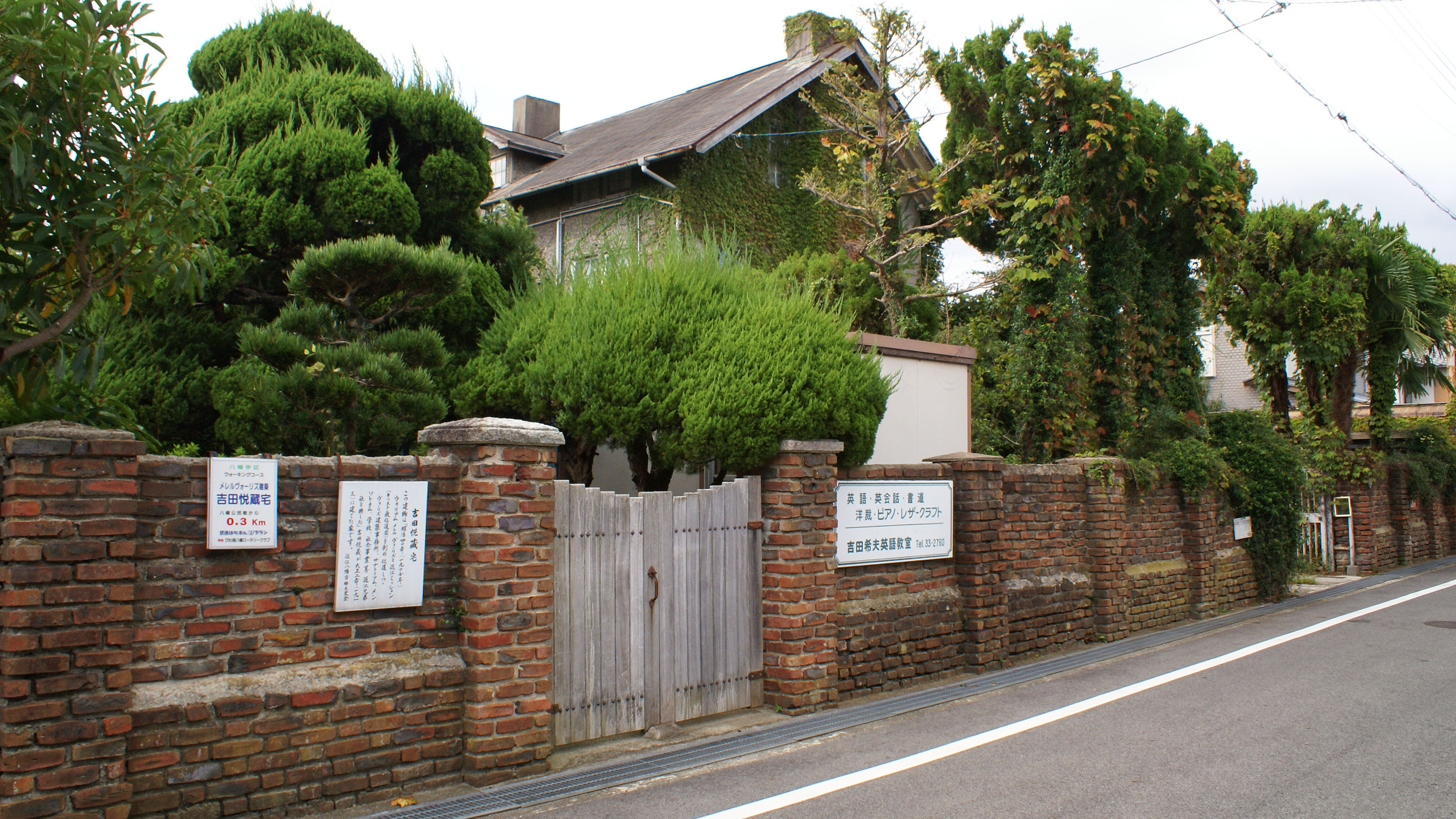 Ikeda-cho in Omihachiman, Shiga, Japan